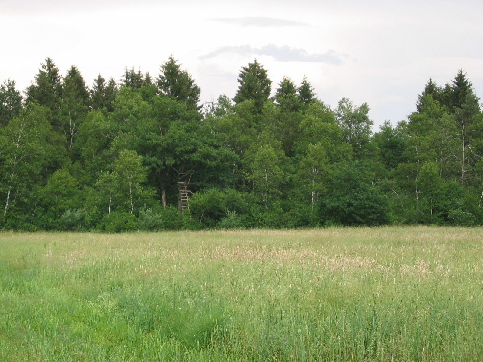 Kozlerjev gozd ali Kozlerjeva gošča, na Ljubljanskem barju.